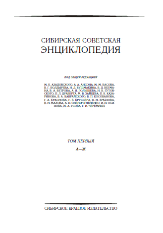 Заглавная страница "Сибирской советской энциклопедии", том 1